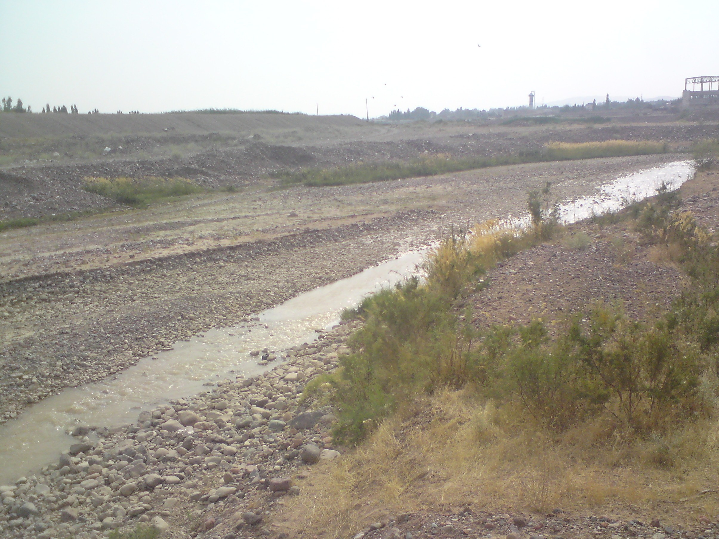 Долина реки Аксакатасай (в период маловодья), правого притока реки Чирчик, Ташкентский вилоят